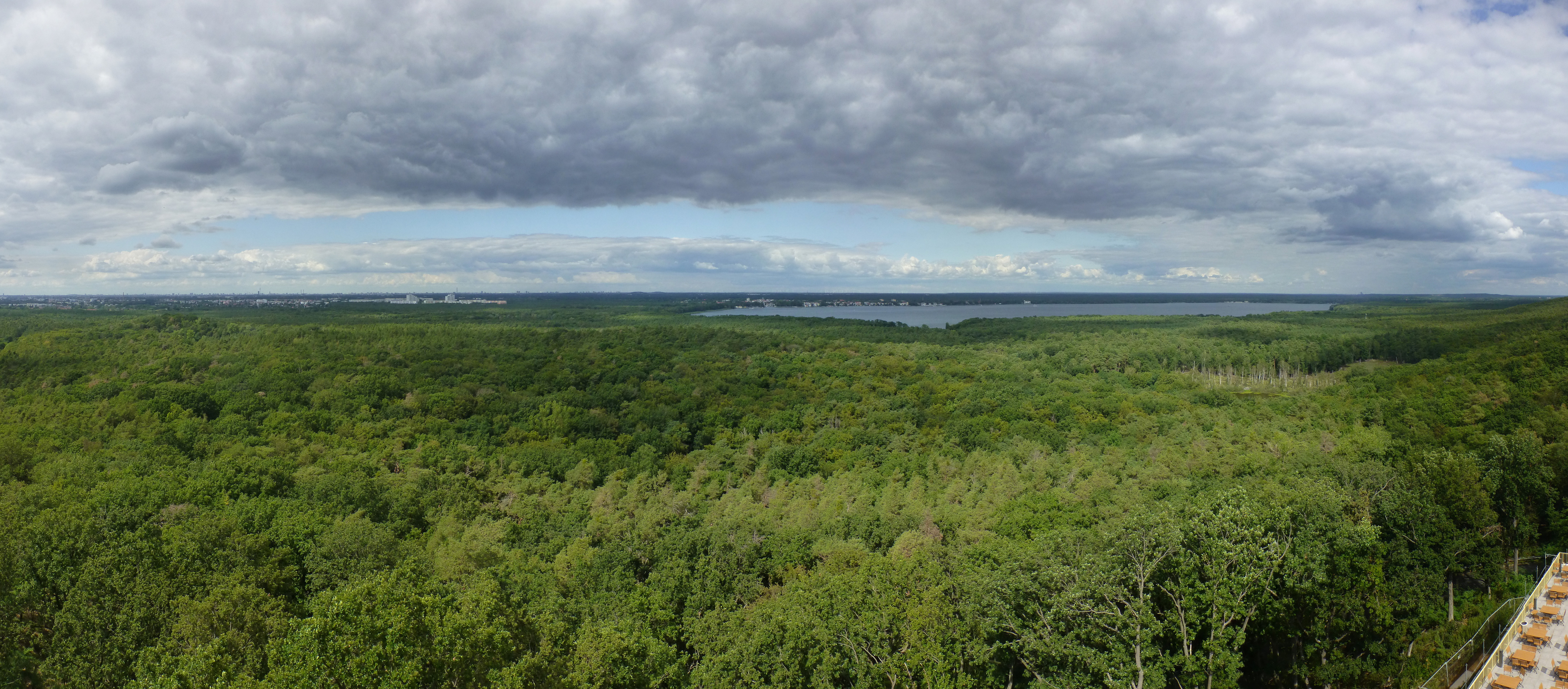 Panoramafoto vom Müggelturm mit Blick nach Norden zum Müggelsee